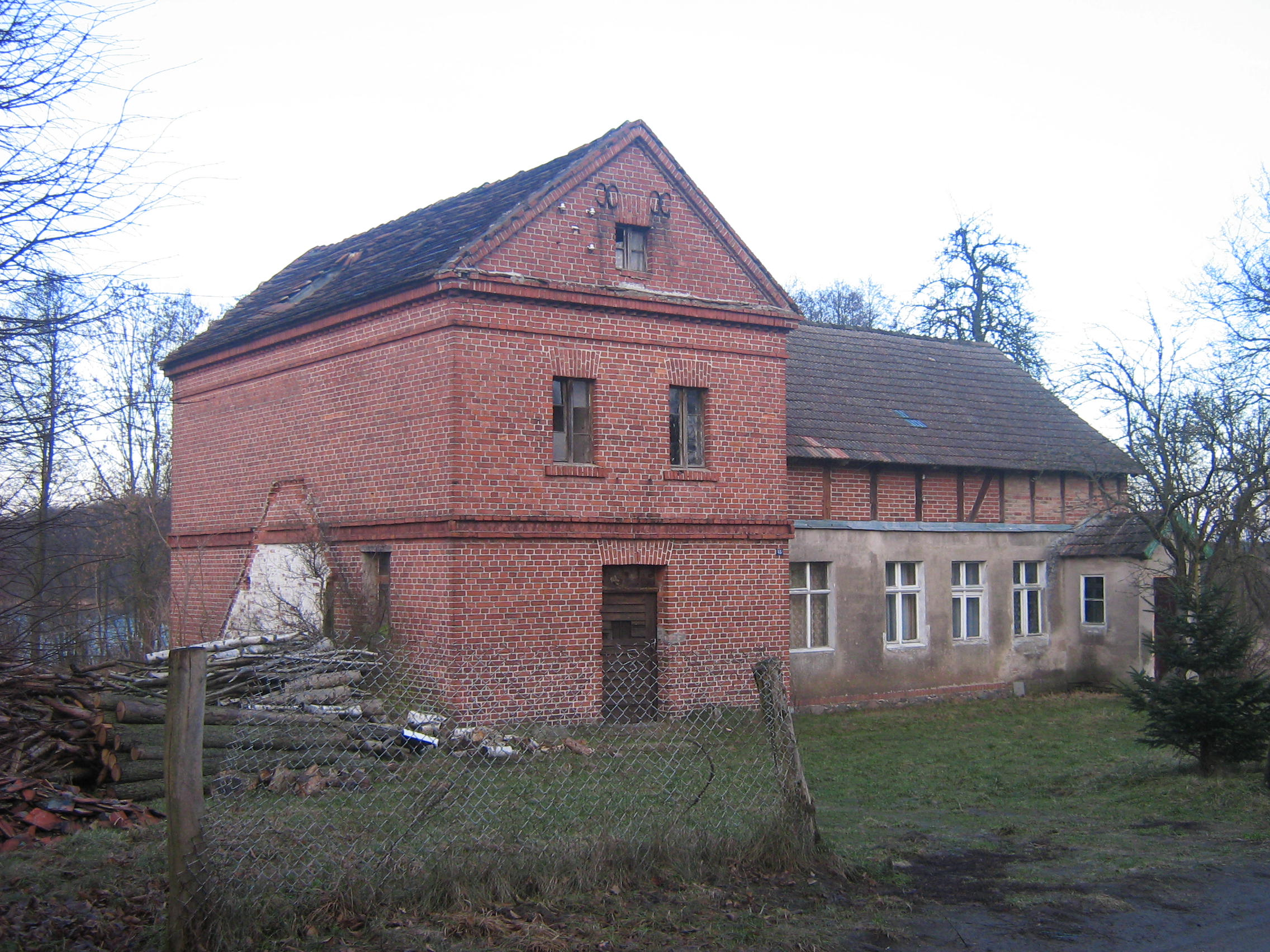 Stary młyn w Warnowie